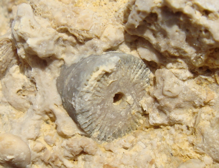 A crinoid fossil from La Pointe du Chay, France.